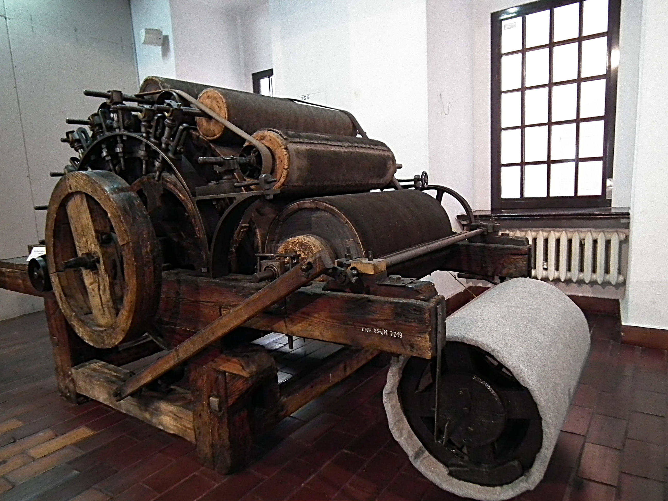 Muzeum Włókiennictwa w "Białej Fabryce" Geyera